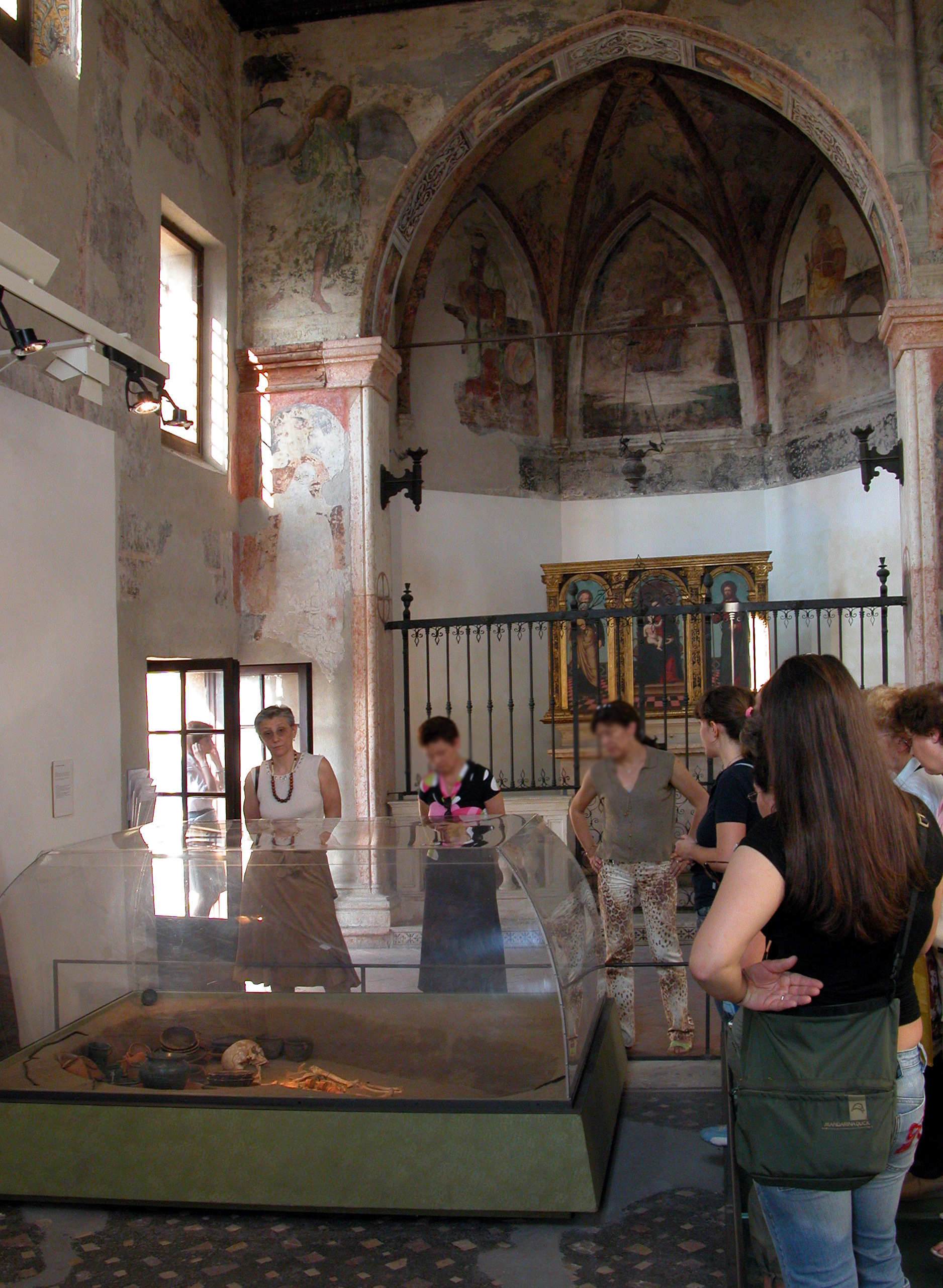 Teatro Romano di Verona - ex chiesa dei Gesuati ora divenuta sala museale